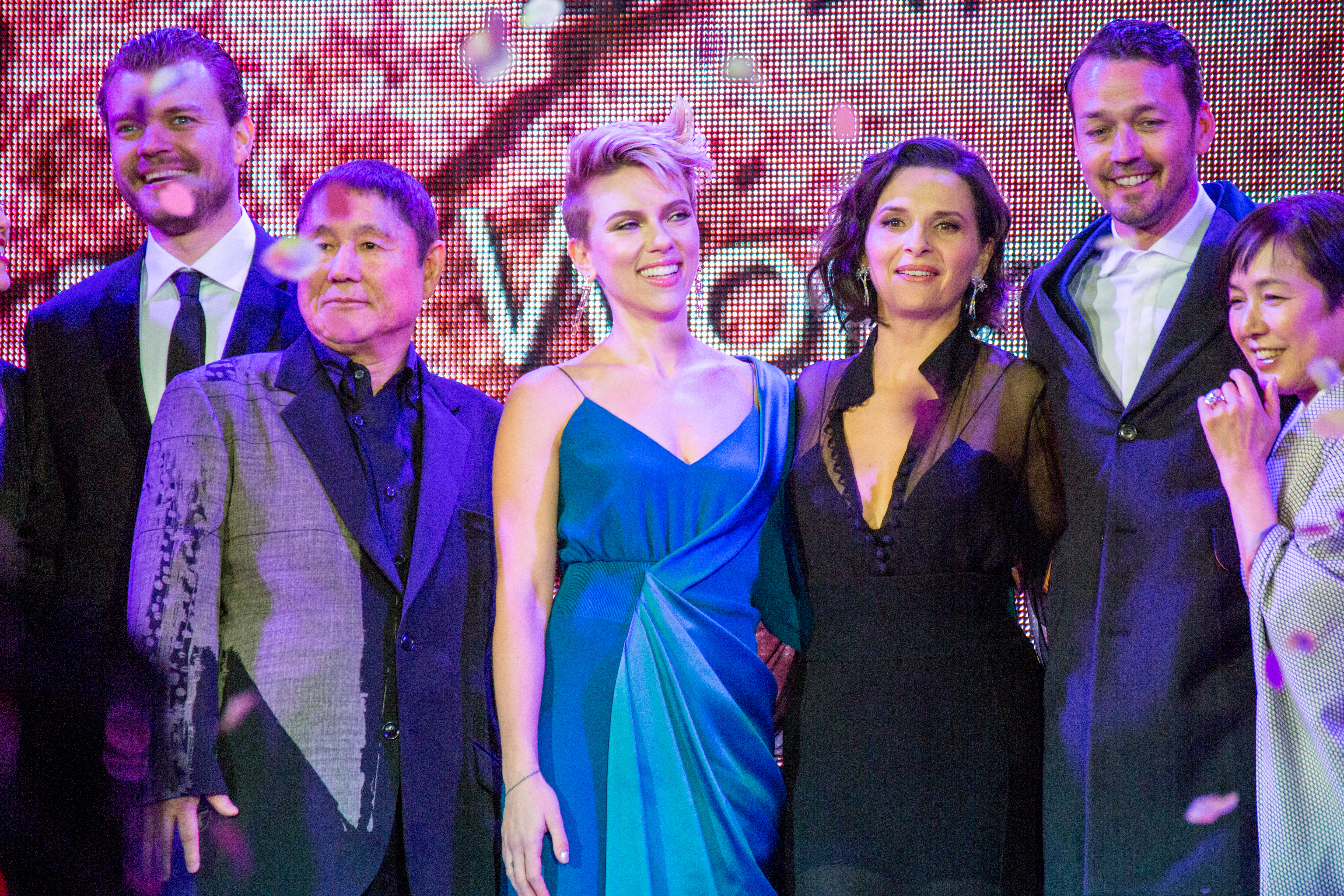 ゴースト・イン・ザ・シェル ワールドプレミアレッドカーペット ピルー・アスベック ビートたけし スカーレット・ヨハンソン ジュリエット・ビノシュ ルパート・サンダース 桃井かおり